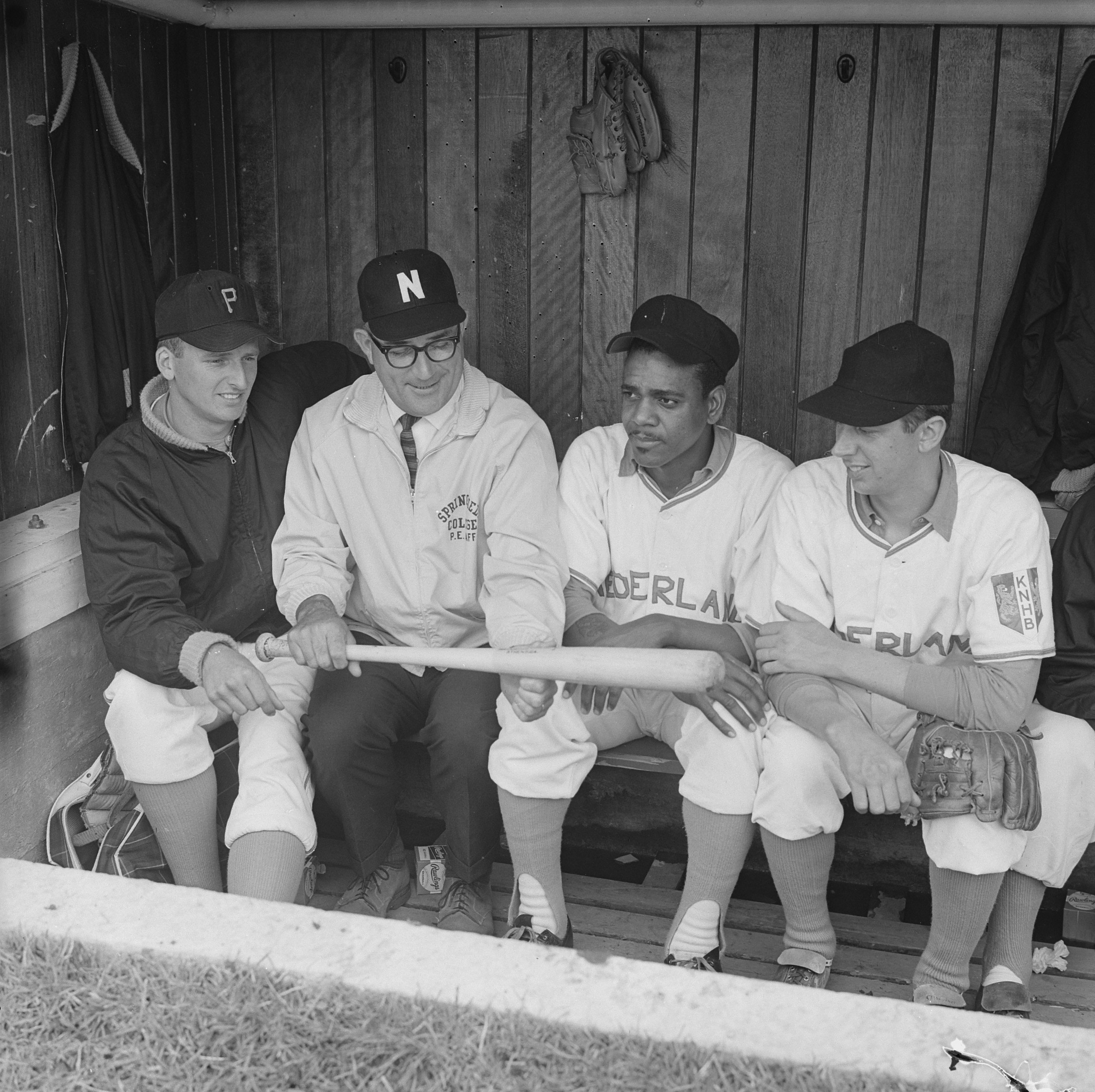 Collectie / Archief : Fotocollectie Anefo Reportage / Serie : [ onbekend ] Beschrijving : Honkbal Nederland tegen Belgie 12-0. Nieuwe coach Archie Allen in gesprek met enkele spelers Kops, Allen, Arrindell en Beidschat Datum : 4 augustus 1963 Trefwoorden : SPELERS, gesprekken Fotograaf : Koch, Eric / Anefo Auteursrechthebbende : Nationaal Archief Materiaalsoort : Negatief (zwart/wit) Nummer archiefinventaris : bekijk toegang 2.24.01.03 Bestanddeelnummer : 915-3975